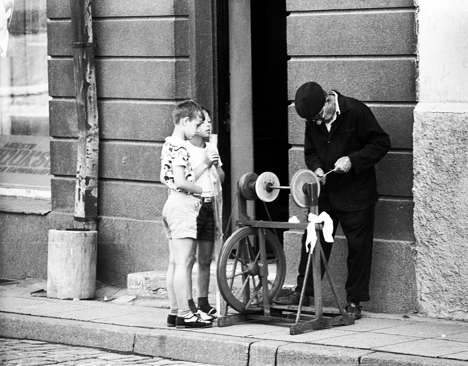 Käiaja Viru tänaval 1974